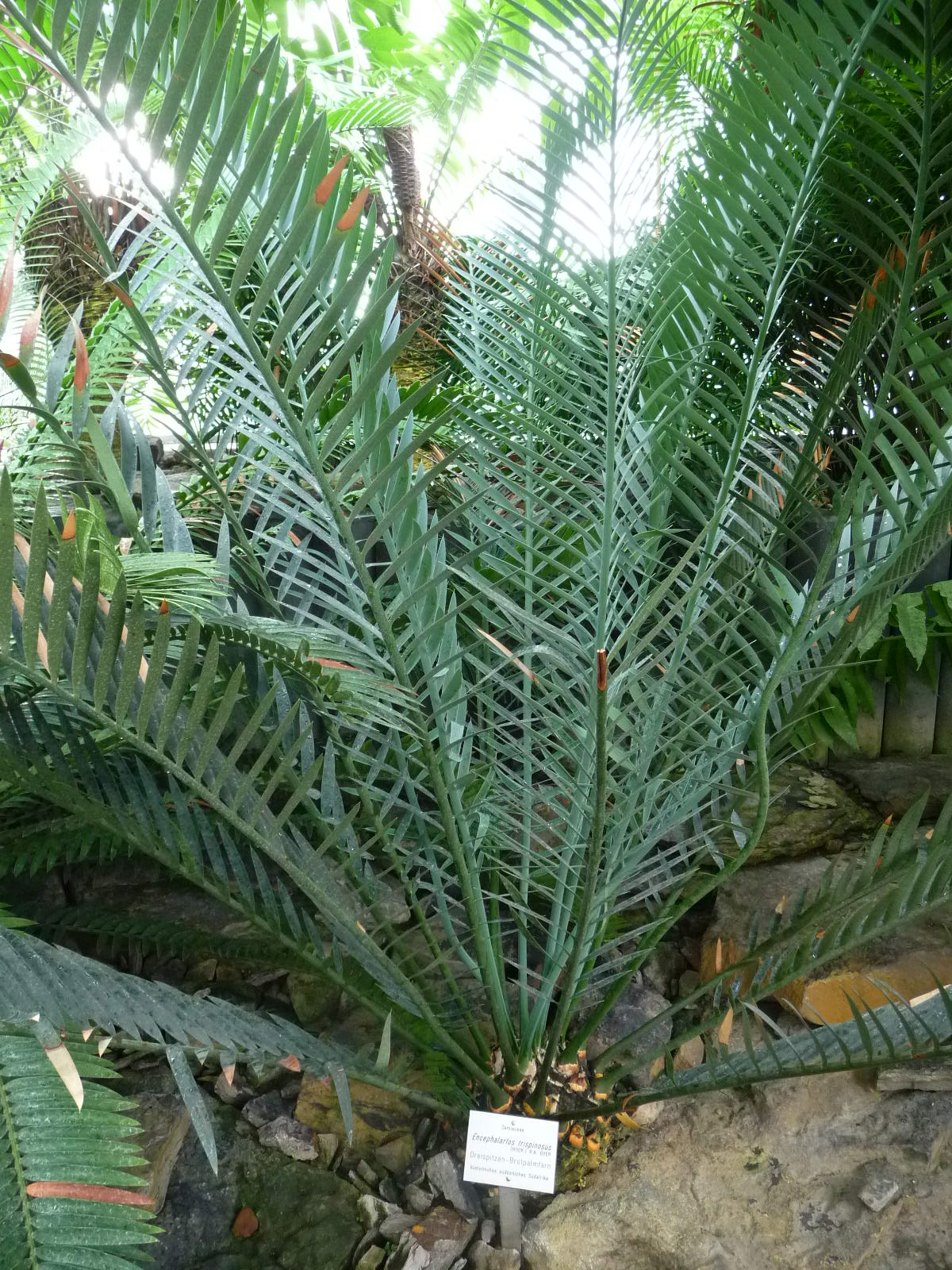 Encephalartos trispinosus (Hamburgi pálmaház)